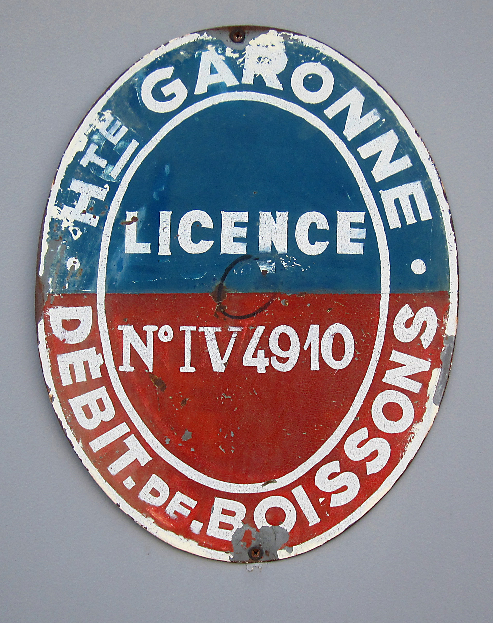 Beauzelle (Haute-Garonne, France) : Plaque de Licence IV.